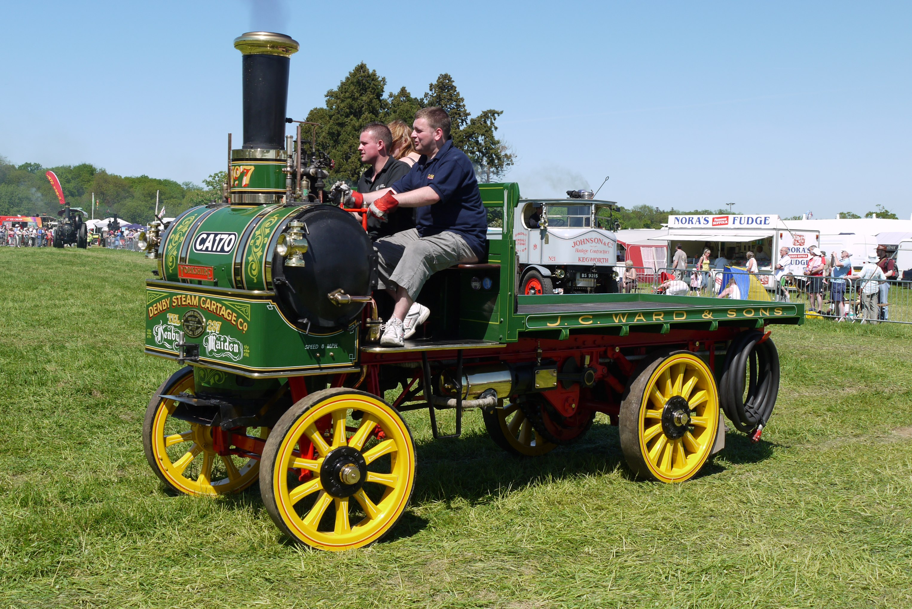 Unusual transverse boiler design. Panasonic G1 14-45 Lens